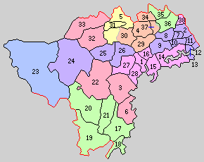 高知県高岡郡の町村制時点の町村。